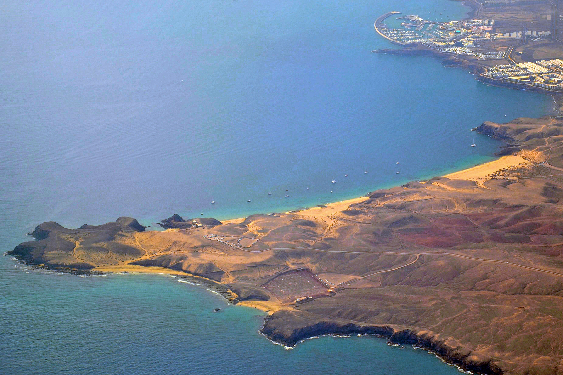 Papagayo-Strände, Lanzarote, Kanarische Inseln, Spanien - Luftbild